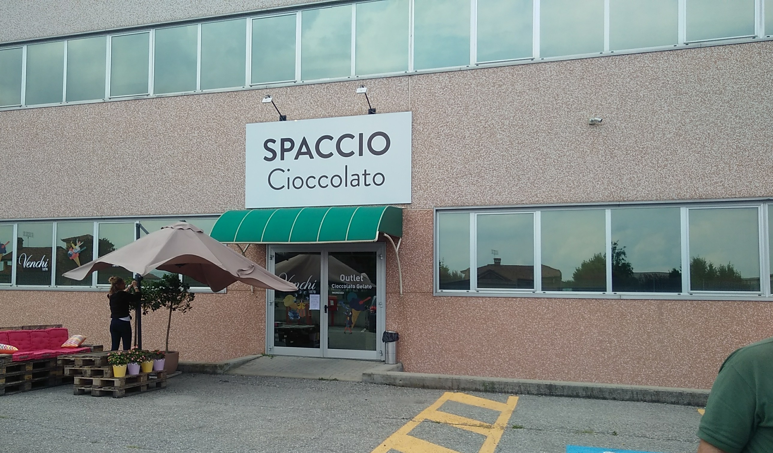 Venchi: lo stabilimento e l'outlet di Castelletto Stura (CN)